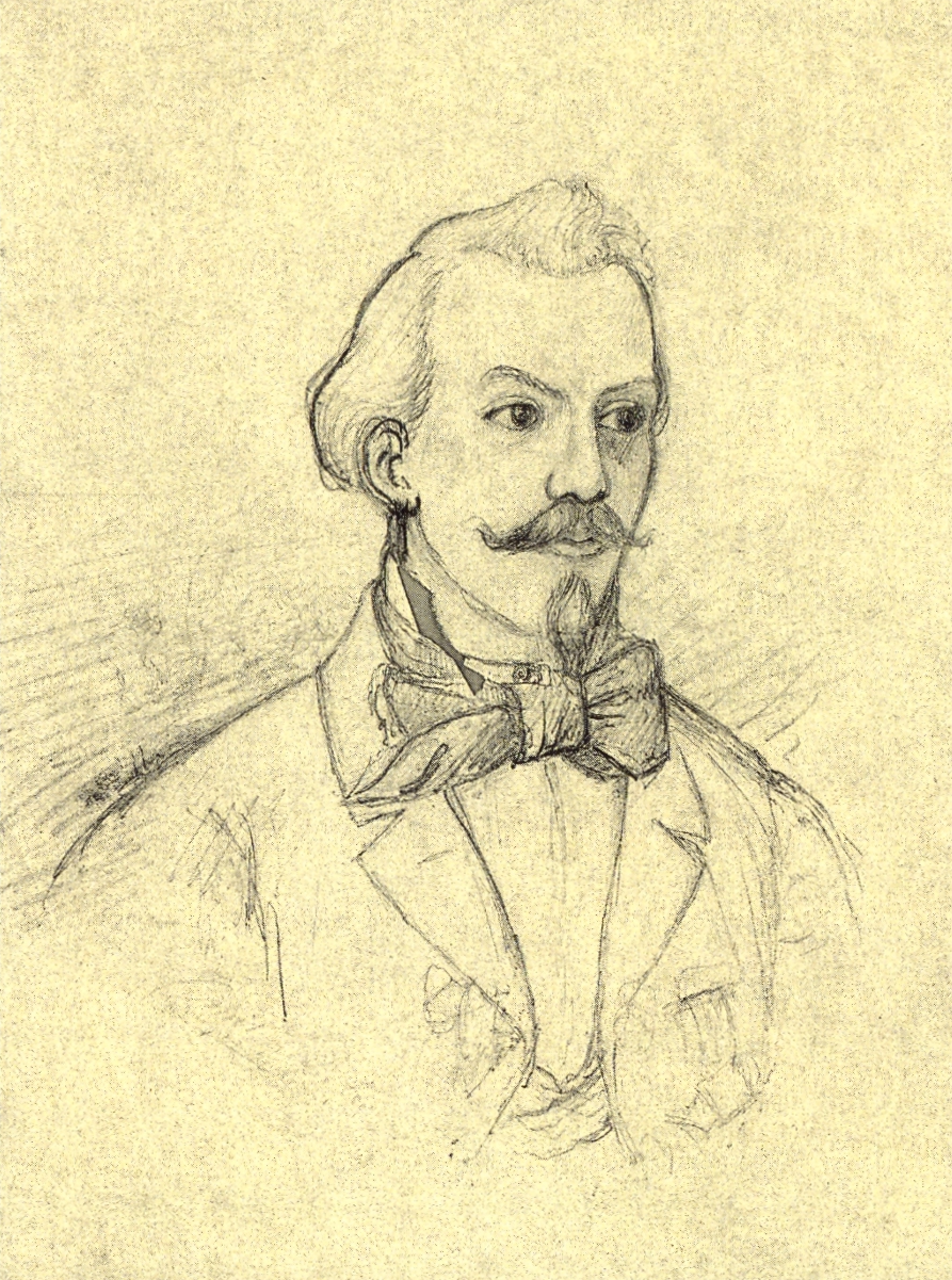 Zitiert aus der Bildbeschreibung des unten genannten Buchs: Emil Zeiß, Selbstbildnis, eventuell aus seiner Studienzeit. WV 1035.